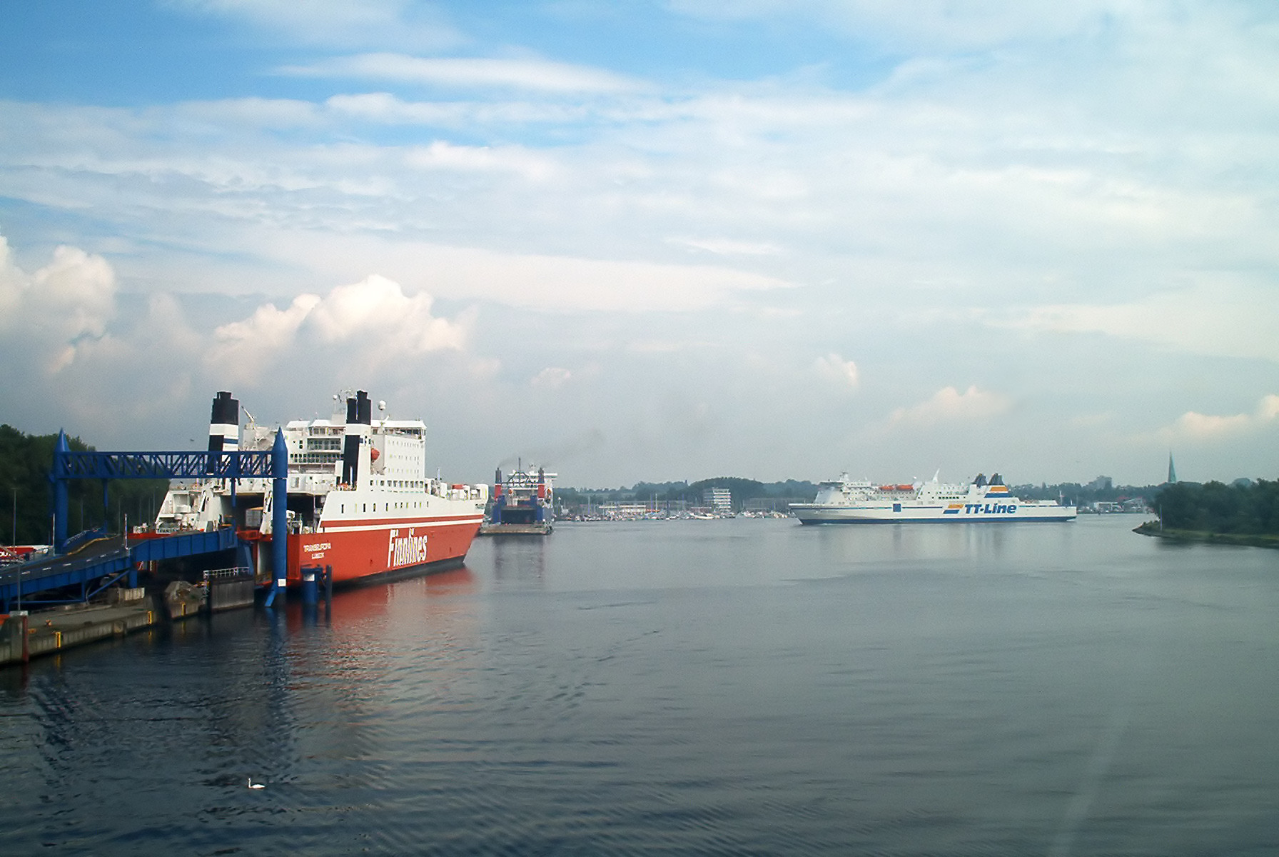 Lübeck Travemünde. Blick von der Fähre Richtung Travemünde mit Fähre im Wendebereich TRANSEUROPA IMO Number: 9010175 MMSI Number: 211687000 Callsign: DMKC Length: 183 m Beam: 30 m